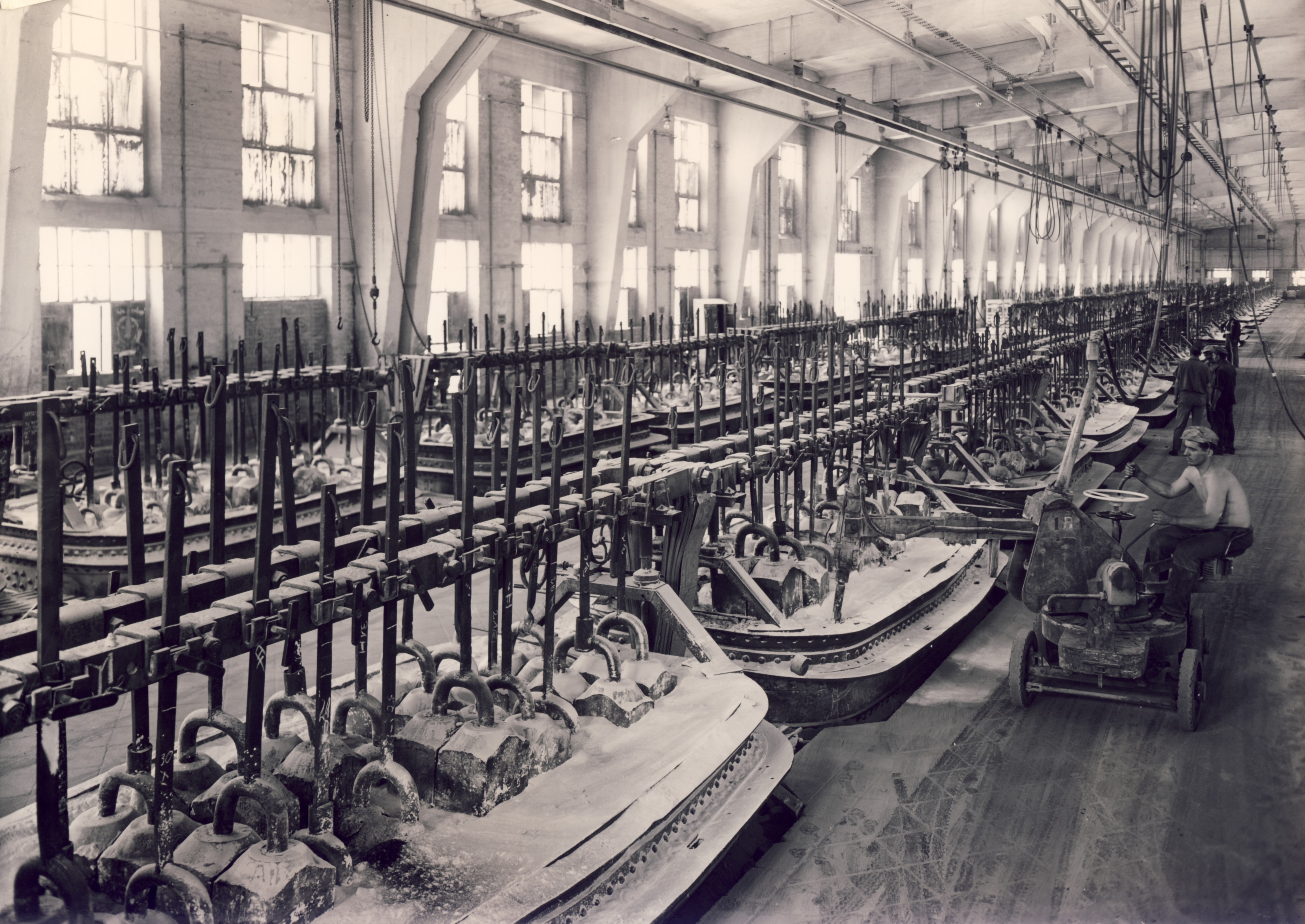 Mechanischer Krustenbrecher an den Aluminium-Elektrolysezellen im EKB